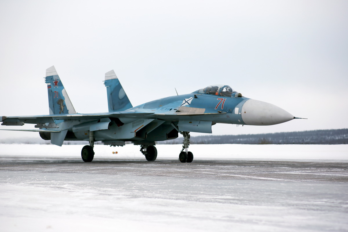 Возвращение самолетов и вертолетов палубной авиации Северного флота с тяжелого авианесущего крейсера «Адмирал Кузнецов» на аэродром в Североморске